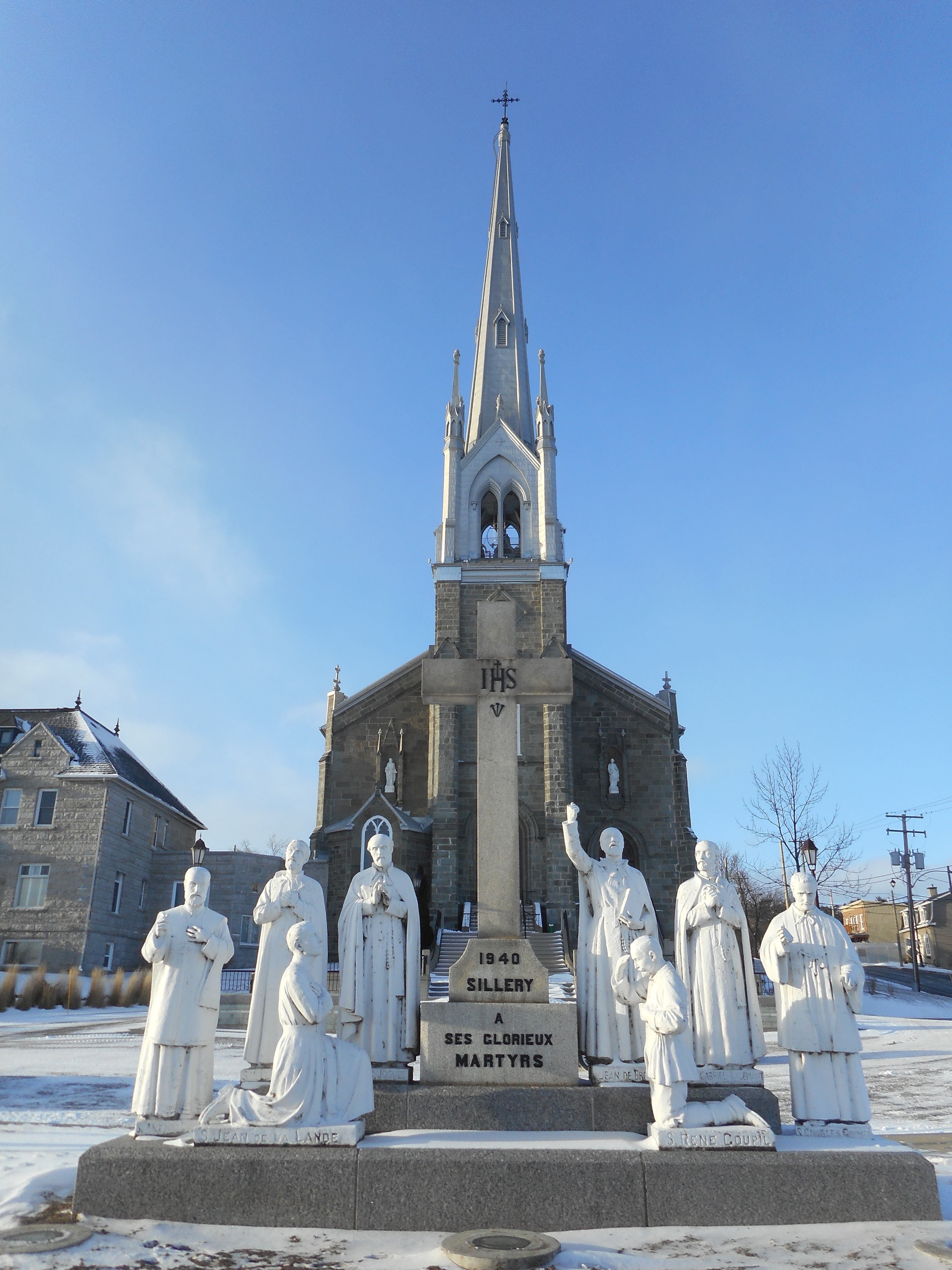 Église Saint-Michel de Sillery, 1600, rue du Cardinal-Persico, Québec (Sillery), Québec « Un monument aux martyrs jésuites canadiens, réalisé par Barsetti & Frères en 1940, rappelle que cette année-là Pie XII a proclamé les martyrs canadiens patrons du Canada, après saint Joseph. Sis au pied du parvis de l’église, ce monument commémore aussi la mission jésuite de l’anse Saint-Joseph. »